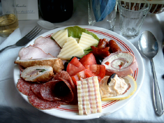 romanian hors d'oeuvres